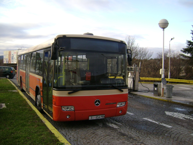 Autobus MB Conecto